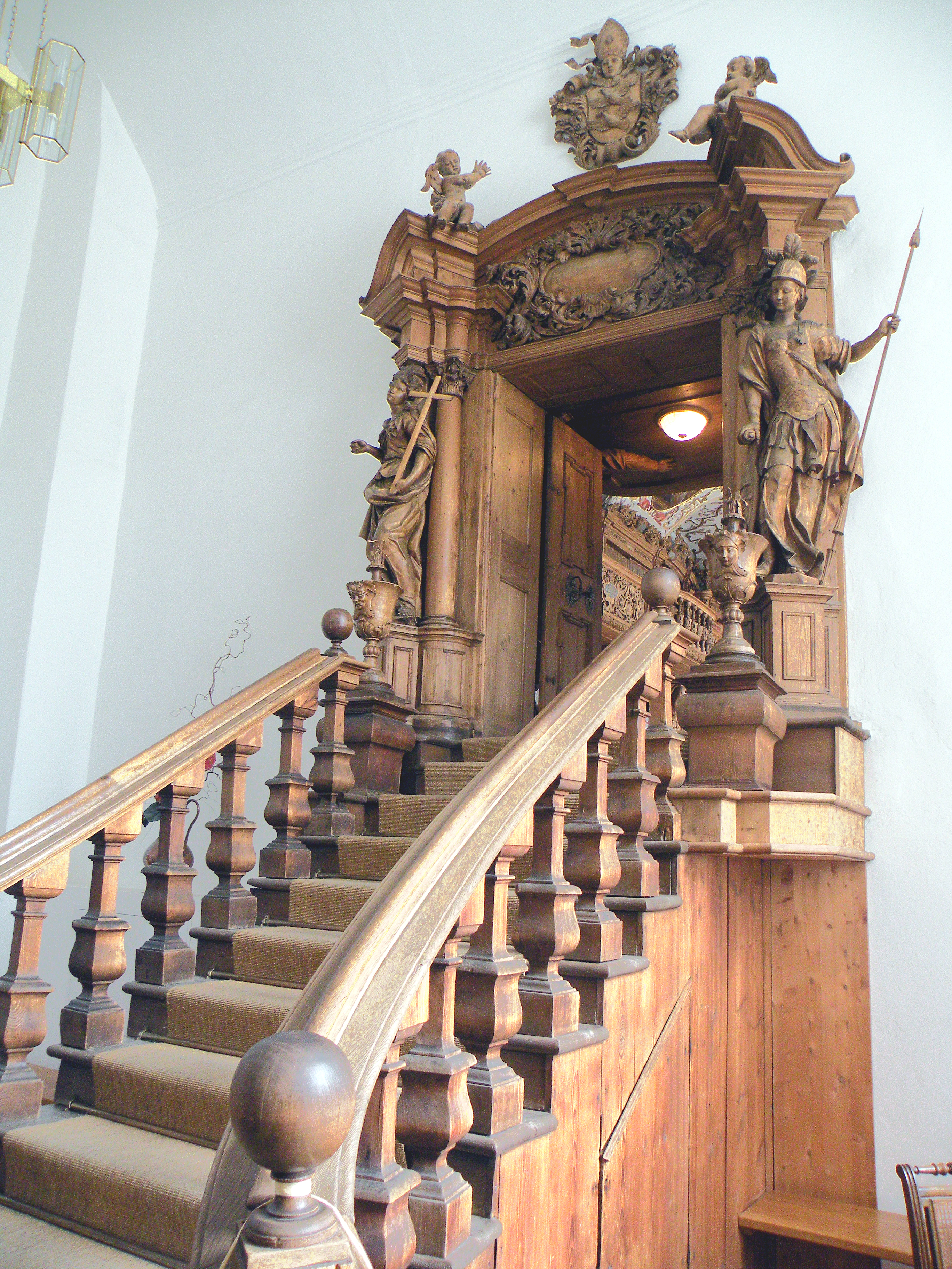 Вальдзассен.Библиотека.Лестница, Eingang zur Bibliothek